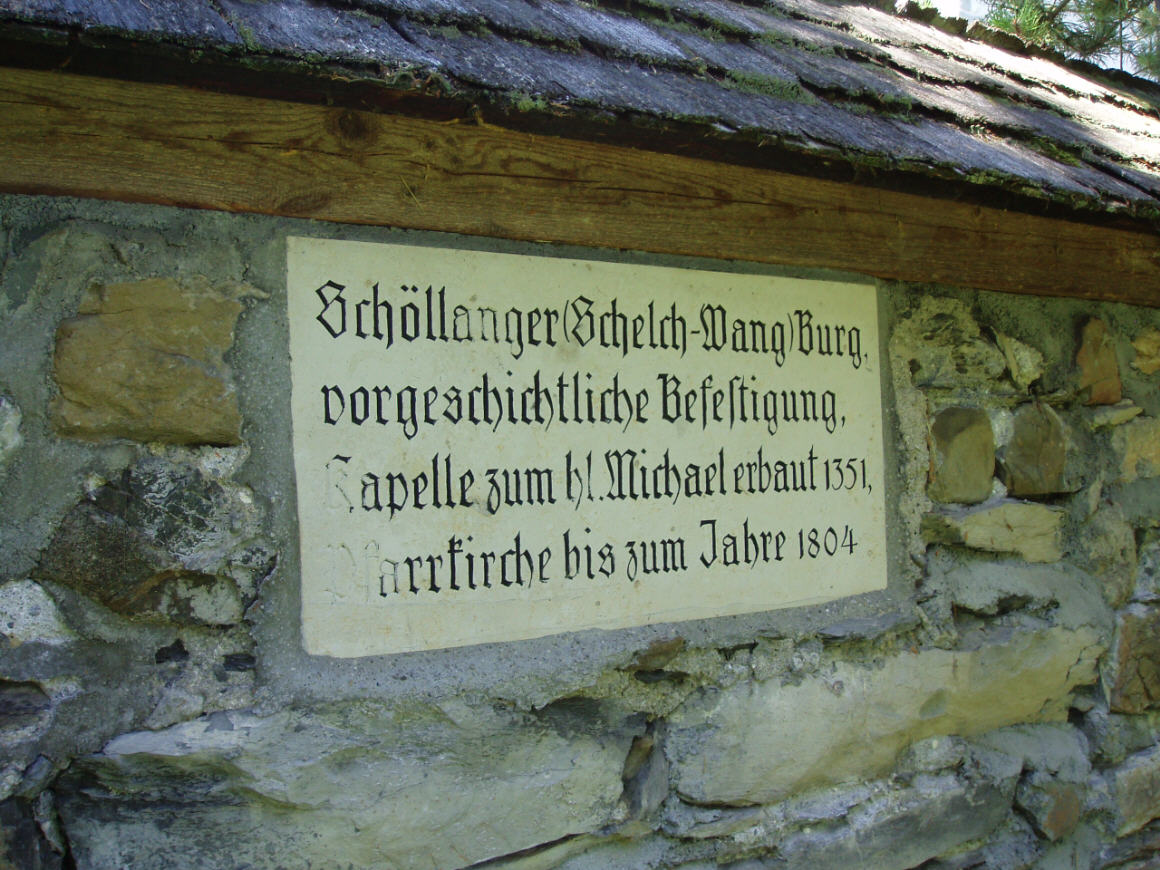 Einfassung des Friedhofs der Burgkirche Schöllang mit Hinweis